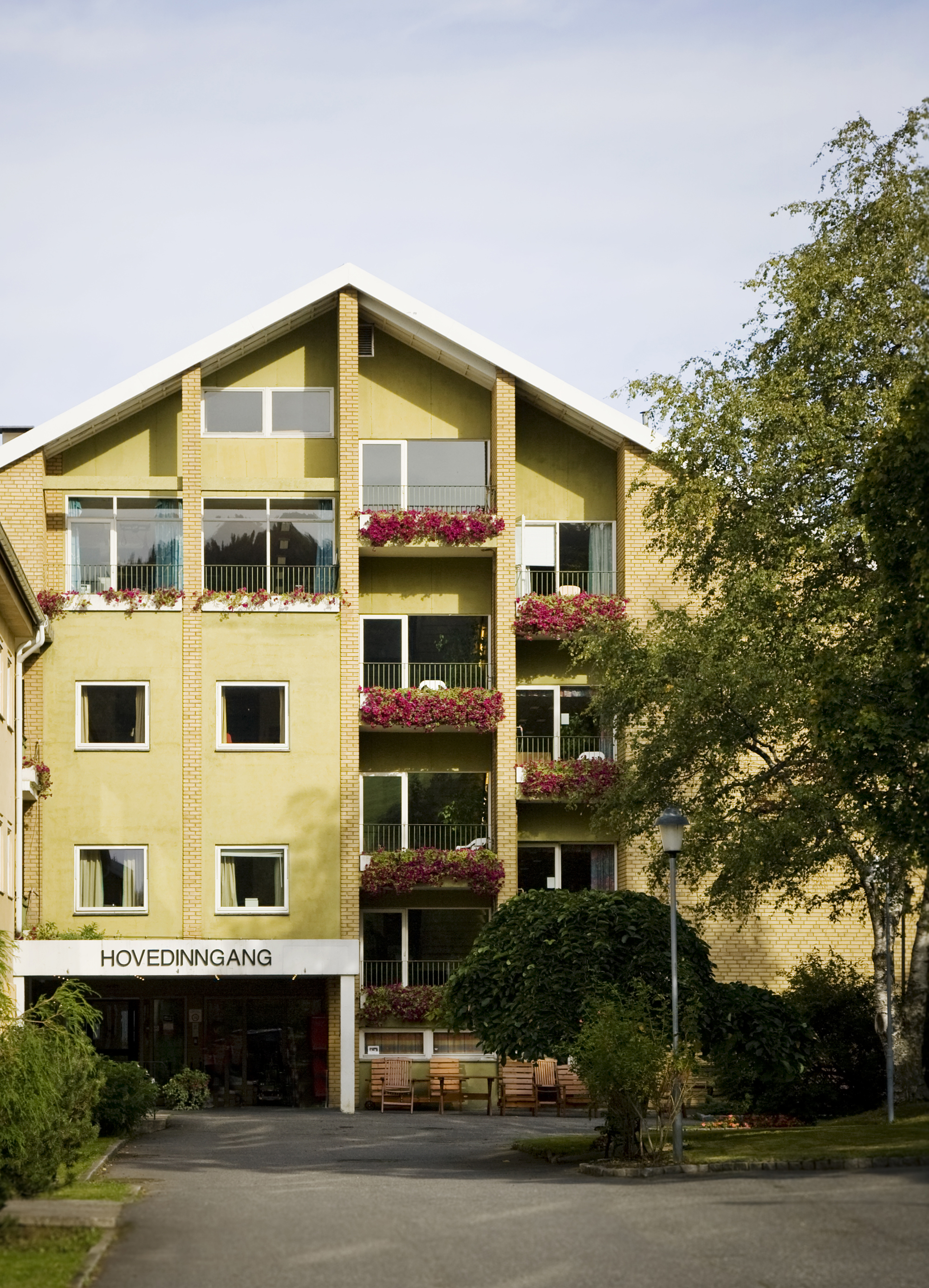 Inngangspartiet ved Skogli